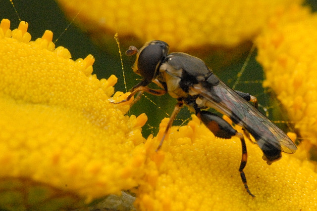 male Syritta pipiens from Commanster, Belgium.